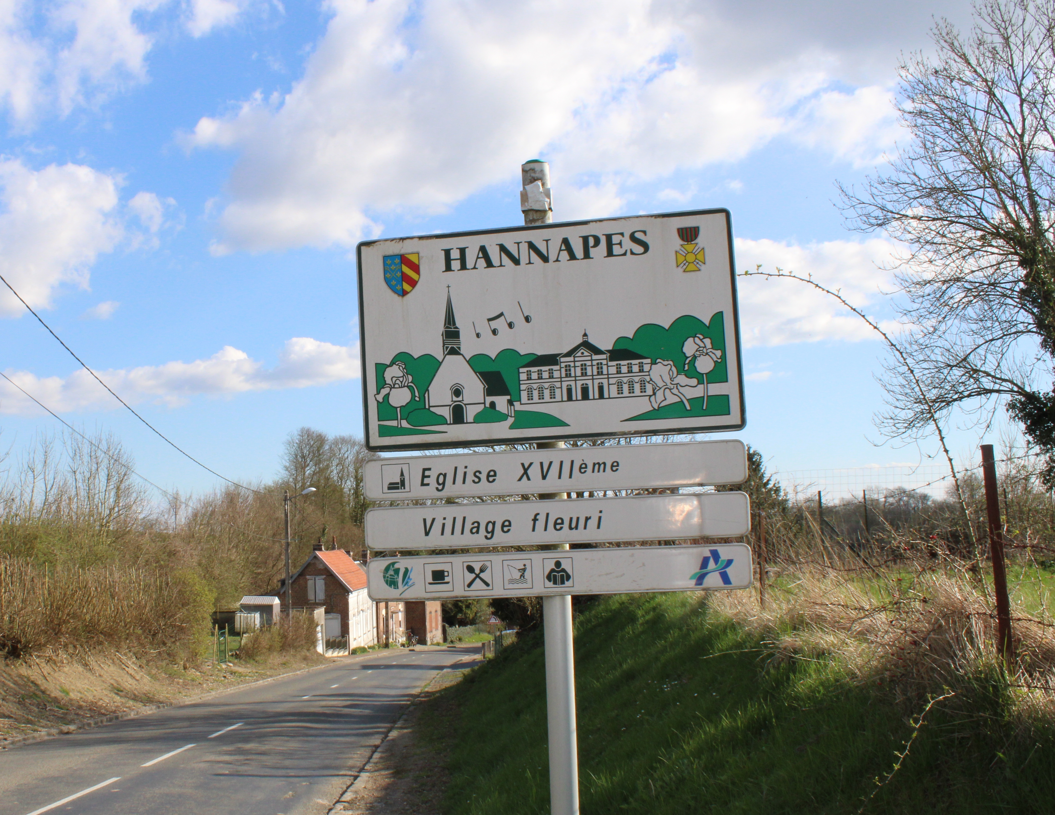 Panneau touristique à l'entrée du village.